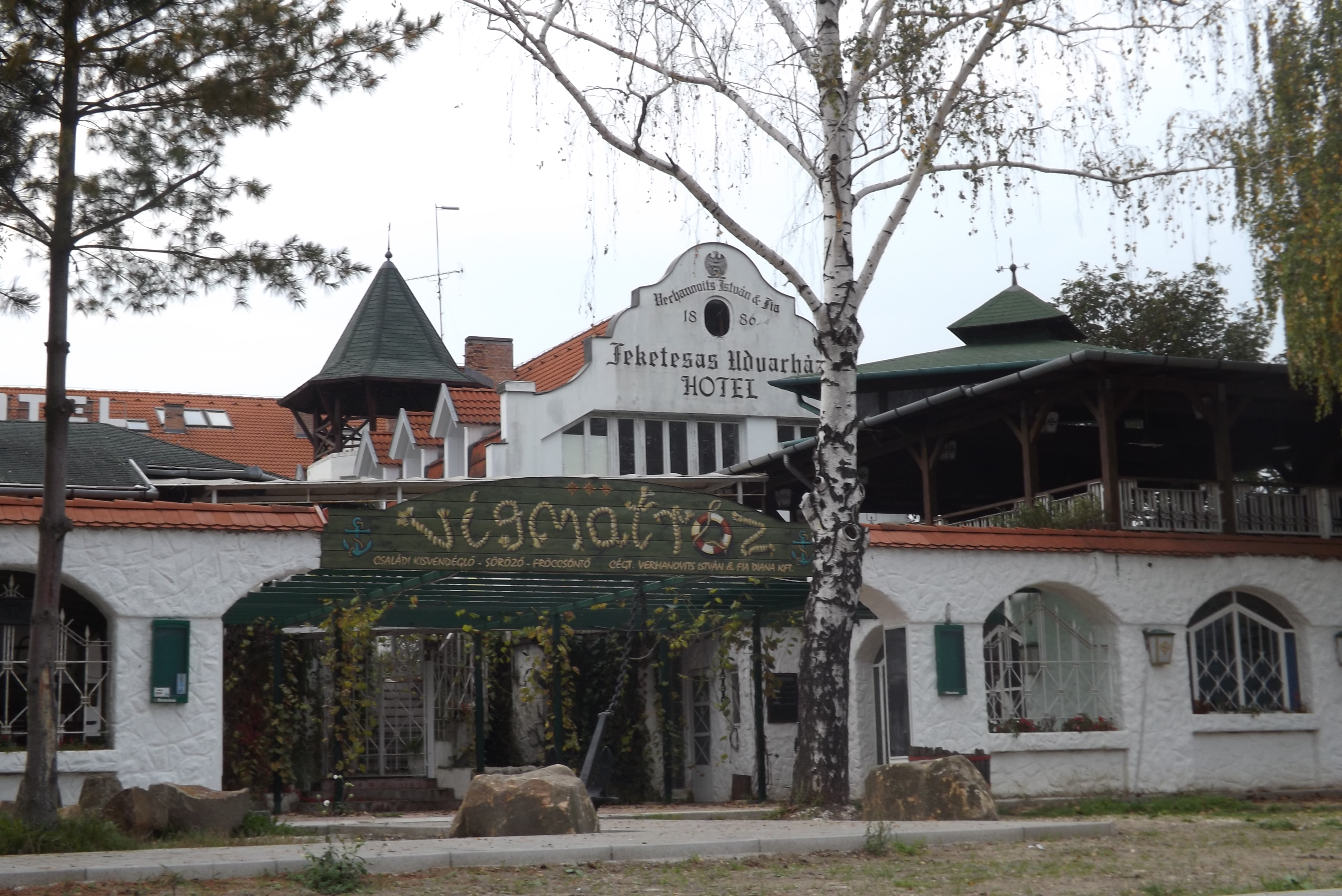 Nagymaros, Fekete sas fogadó a Vígmatróz Családi Kisvendéglő. Cím: 2626 Nagymaros, Hunyadi sétány 2.